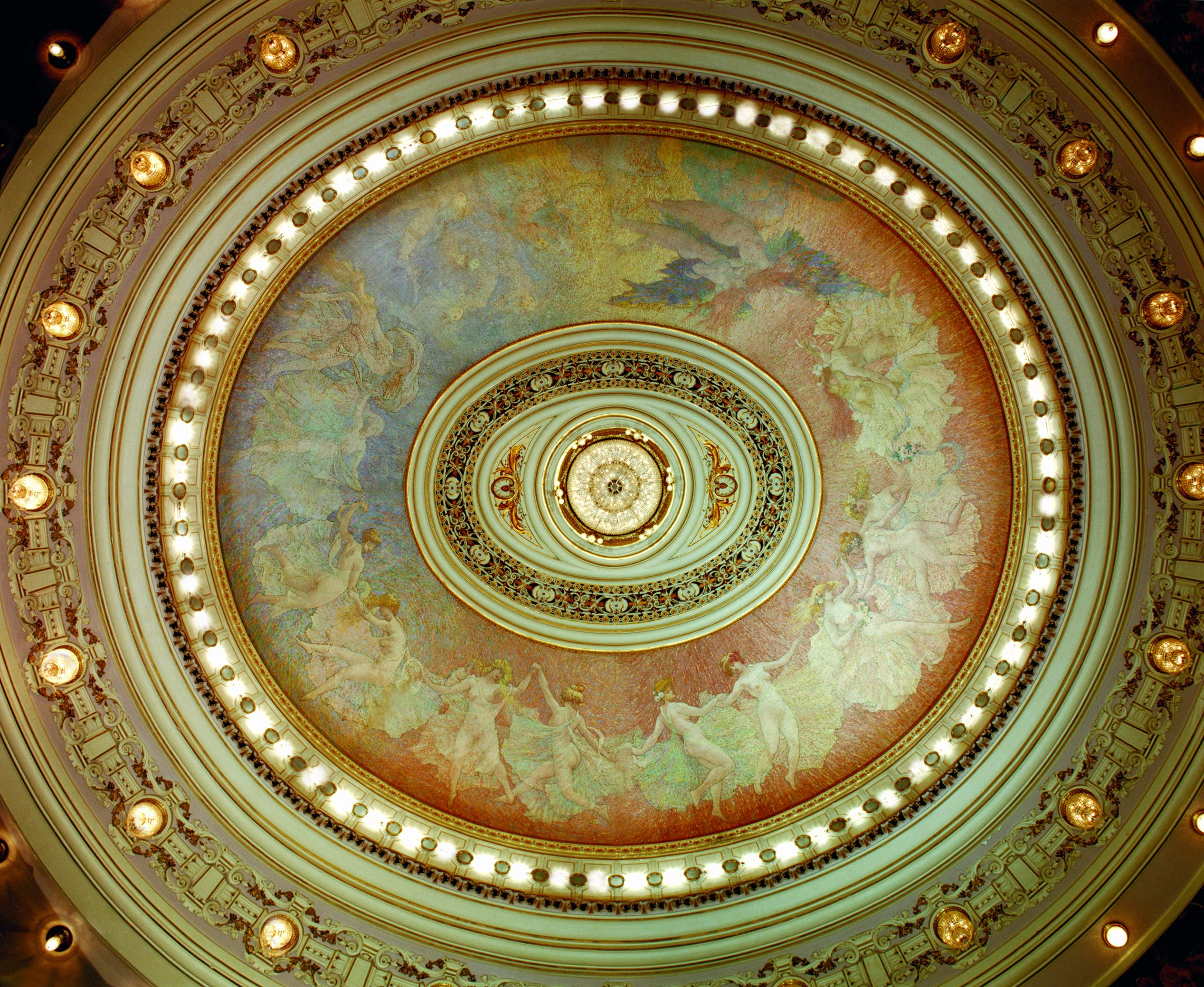 Obra do Projeto Eliseu Visconti